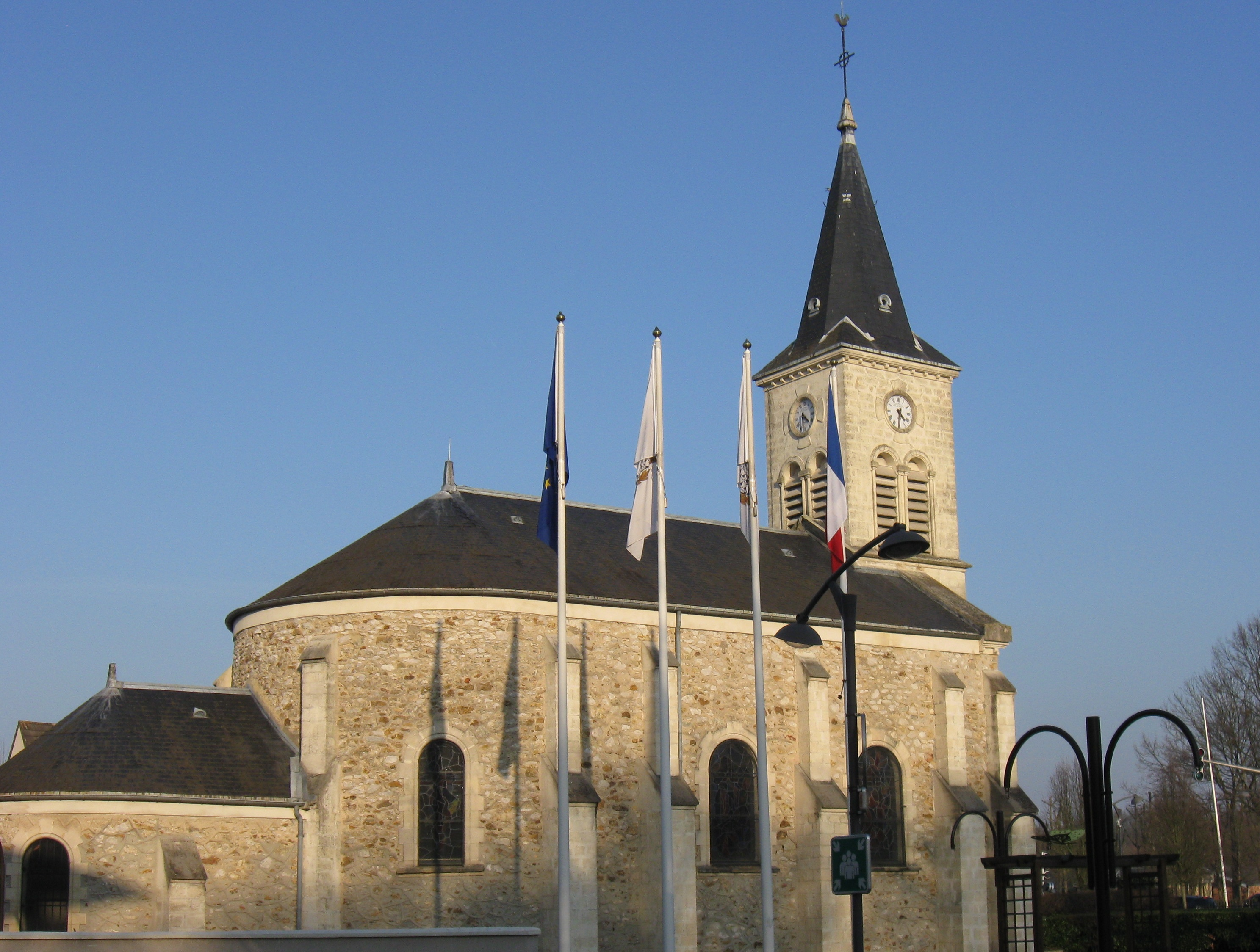 Église Saint-éloi d'Émerainville. (Seine-et-Marne, région Île-de-France).